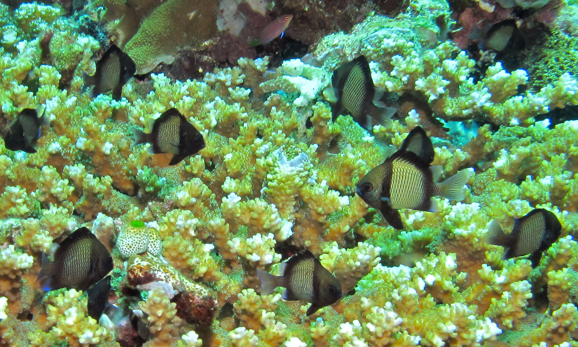 Likuan II, Bunaken Island, Sulawesi, INDONESIA